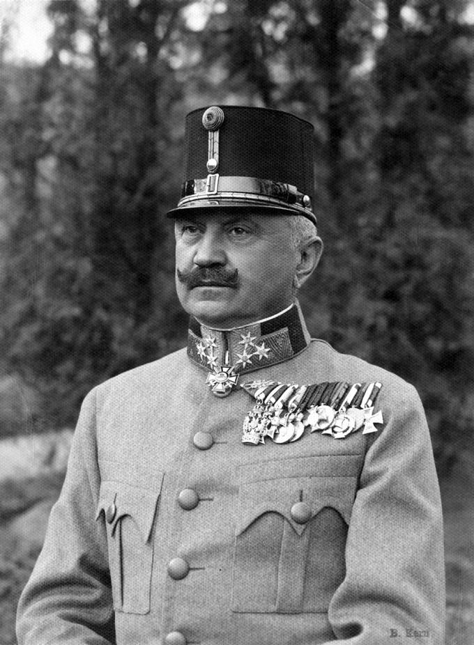 Podmaršal Lipošćak (1863-1924)